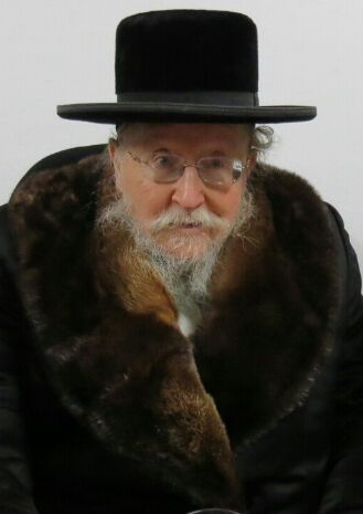 הרב בן ציון רבינוביץ מביאלא